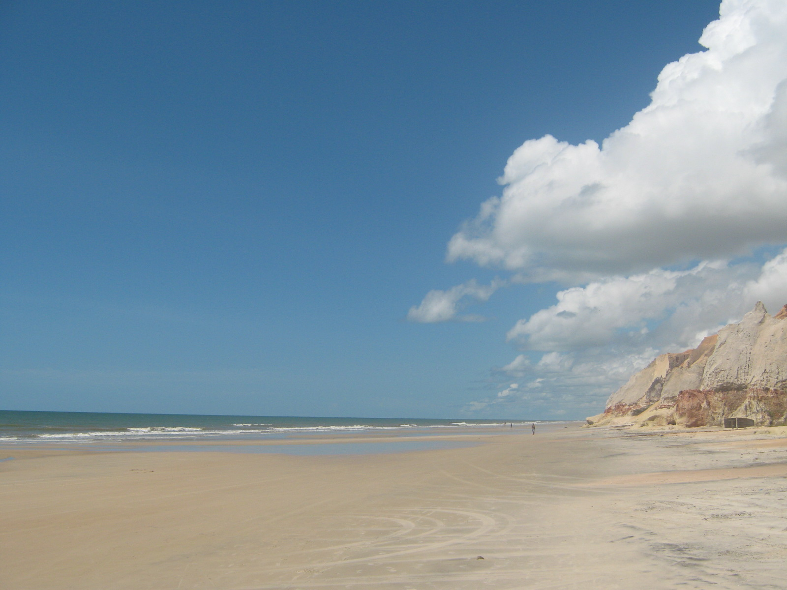 Fontes Beach, Fortaleza, Brazil